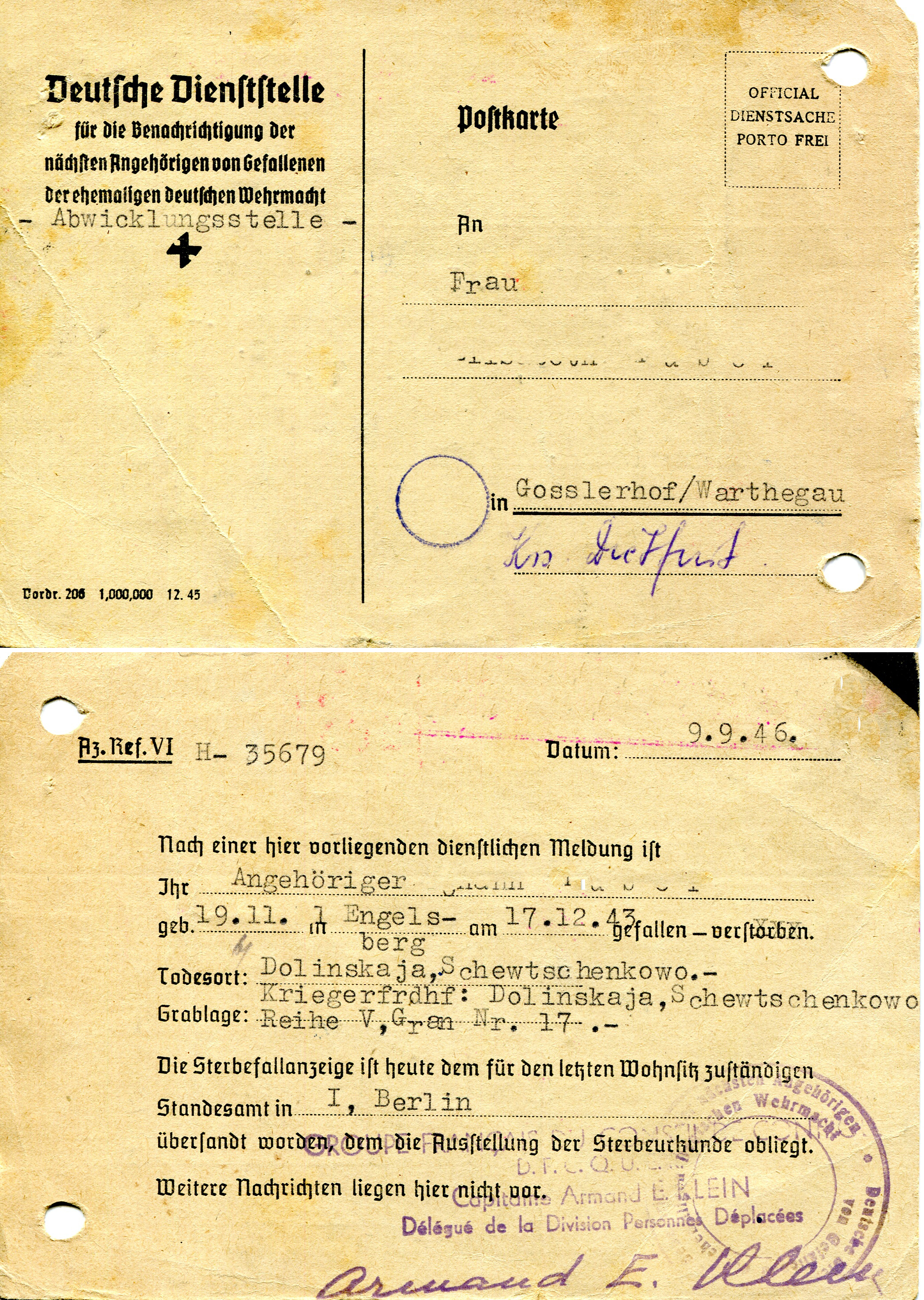 Benachrichtigungs-Postkarte der Deutschen Dienststelle (WASt) an die Angehörige eines Gefallenen, mit der Unterschrift des französischen Capitaine Armand E. Klein vom Alliierten Kontrollrat der französischen Besatzungsverwaltung, dem 1946 der Betrieb der Dienststelle übertragen wurde.